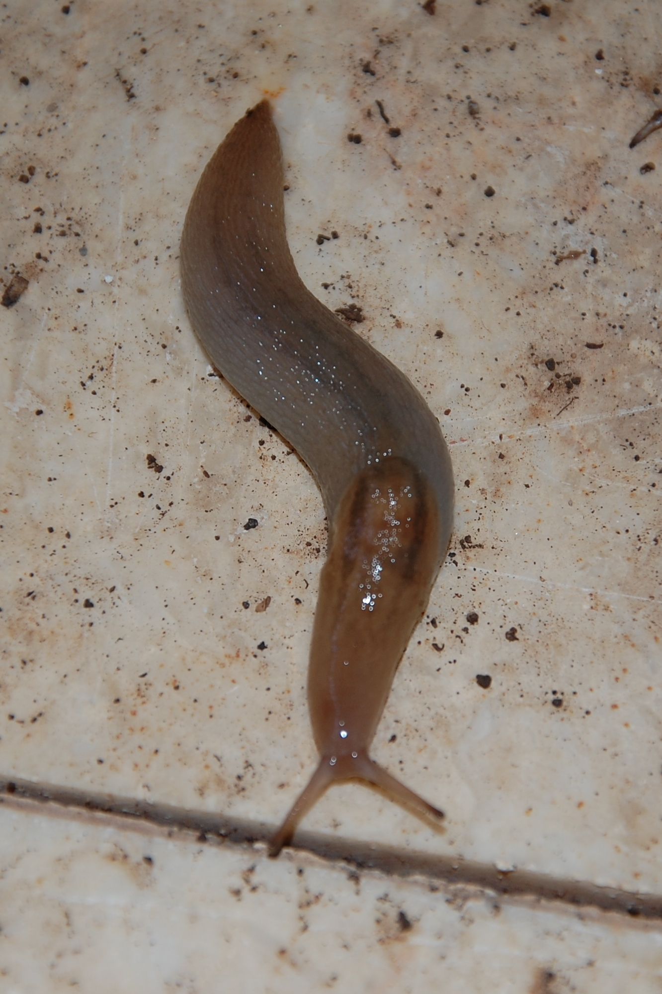 Lehmannia melitensis Sicily